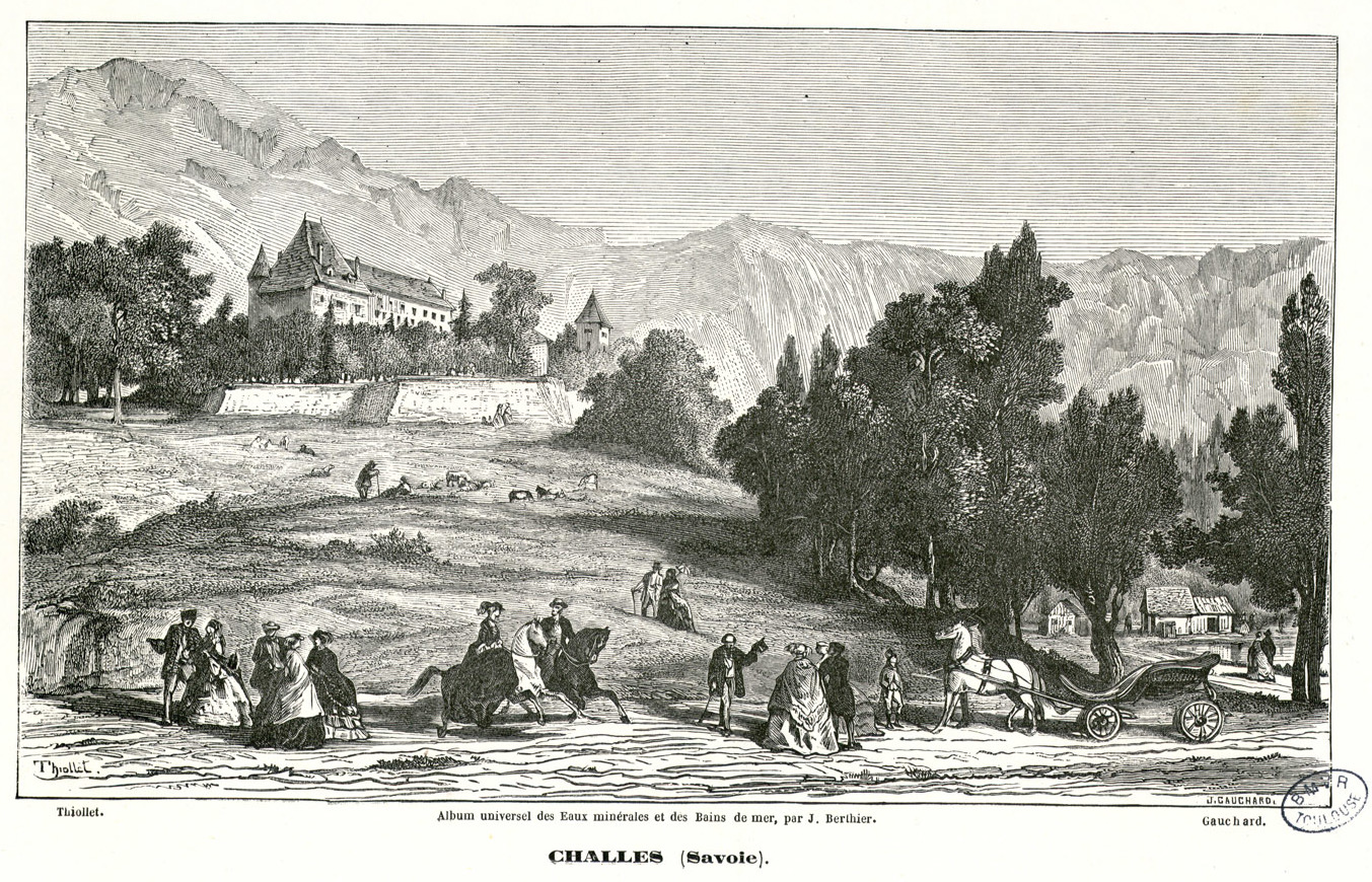 22 planches gravées sur bois et sur acier hors-texte (dont 5 portraits). - Nombreuses vignettes gravées sur bois dans le texte, tableaux synoptiques, guide des Chemins de fer aux stations de France et de l'étranger, catalogue des ouvrages publiés sur l'hydrologie, documents divers dont nombreuses publicités. Pl. 1, 22 et vignettes 1, 8, 13, 16 dessinées et gravées par J. Gaildrau et Gauchard. - Pl. 2, 3, 4 dessinées et gravées par Bocourt et Gauchard. - Pl. 5 dessinée et gravée par Bocourt. - Pl. 6, 7, 8, 16, 17, 18, 19 dessinées et gravées par Wormser, imprimées par N. Rémond et publiées par Victor Masson. - Pl. 9, 13, 15 et vignettes 2, 6, 9 dessinées et gravées par Thiollet et Gauchard; f. de pl. 10, 14, 20 dessinées et gravées par Ch. Jacque. - Pl. 12 dessinée et gravée par E. Riou et E. Roevens. - Vignettes 3 et 4 dessinées et gravées par Ch. Jacque et Sargent. - Vignettes 14 et 15 dessinées et gravées par Debelle-Champin. Rel. demi-chagrin rouge, dos plat à faux nerfs Ex dono ms. : "A Monsieur le Directeur du mémorial des Pyrénées. Témoignage de bonne confraternité. Paris le 1er juin 1862. J. Berthier" Ancely, René (1876 - 1966). Possesseur